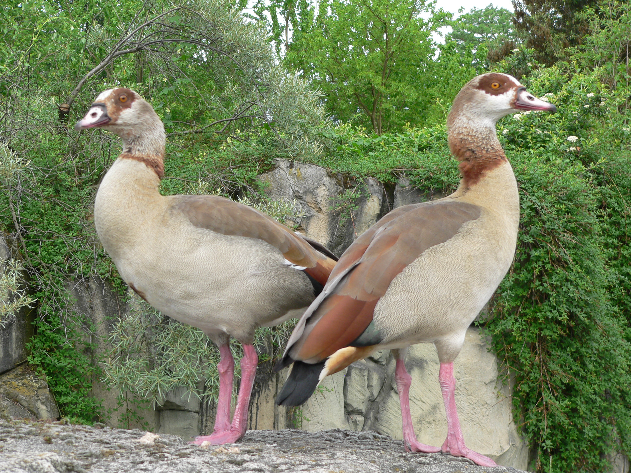 Nilgans